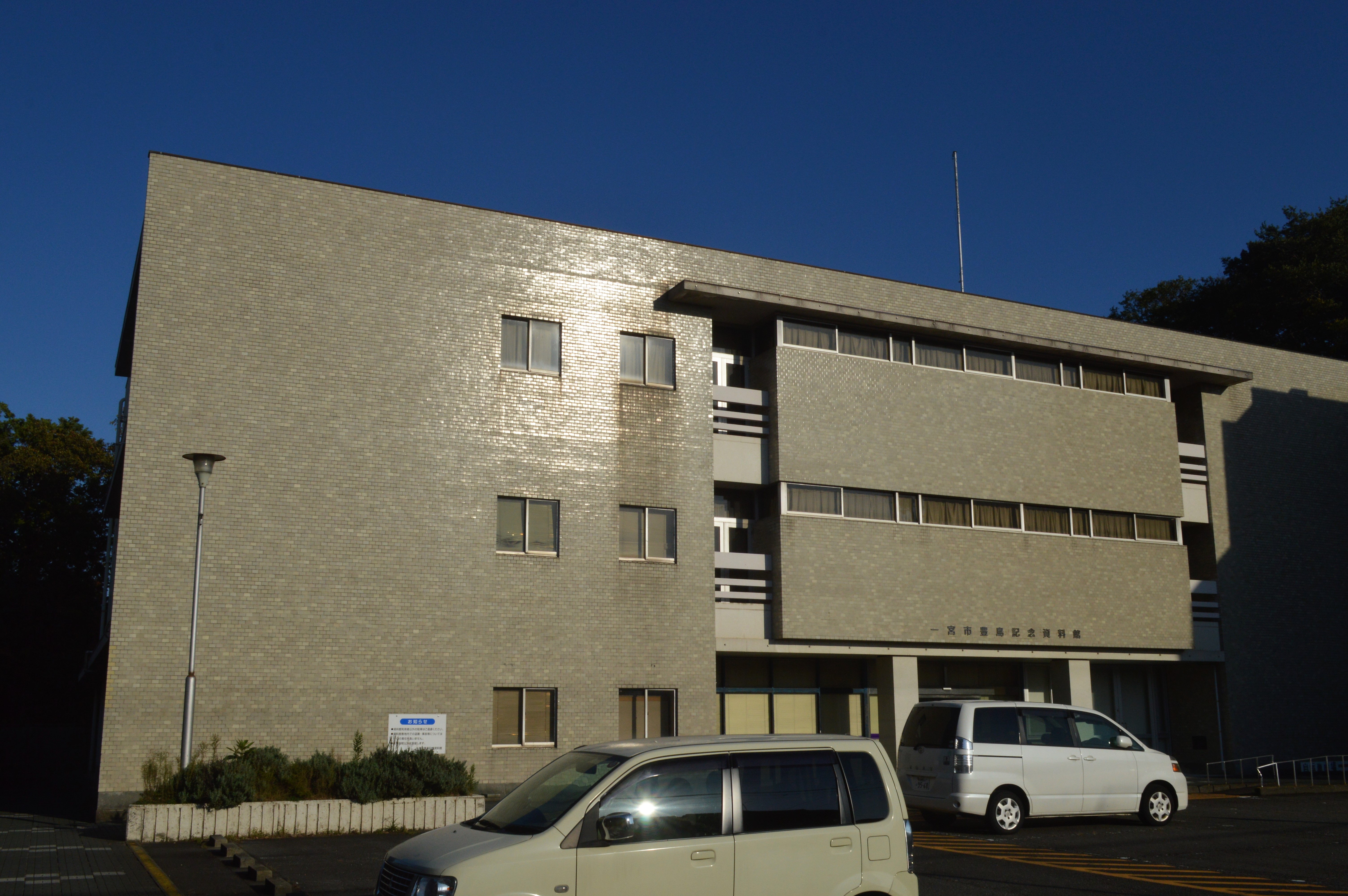 愛知県一宮市の一宮市博物館豊島記念資料館（旧・一宮市立豊島図書館）。